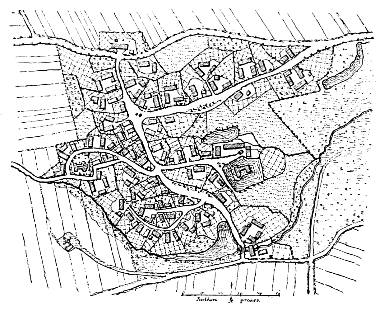 Germanic Village Geusa, Prussian Saxony.